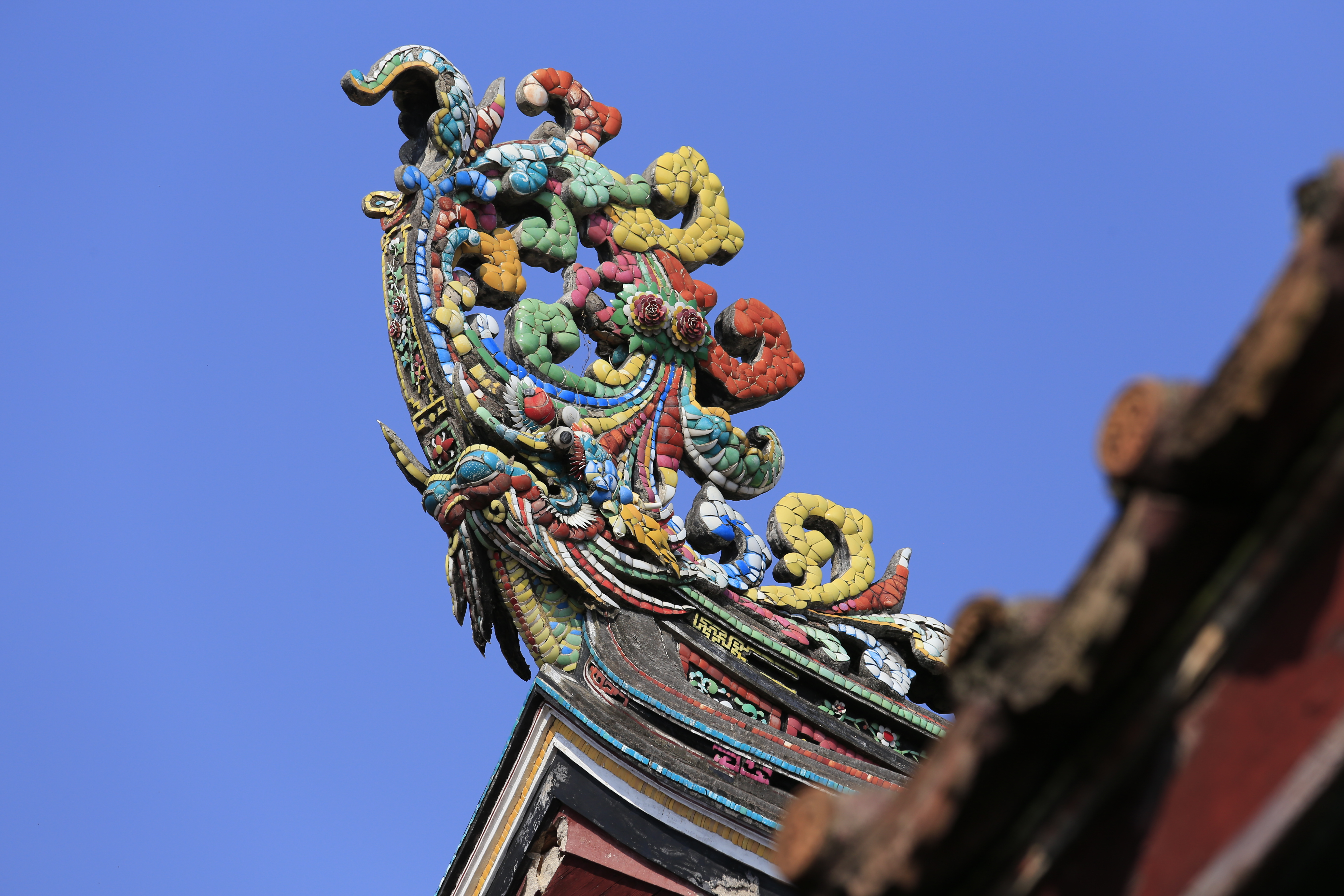 潮州开元寺 大雄宝殿